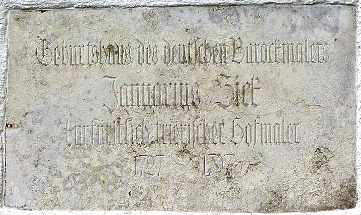 Gebäude in Lachen, Landkreis Unterallgäu, Bayern